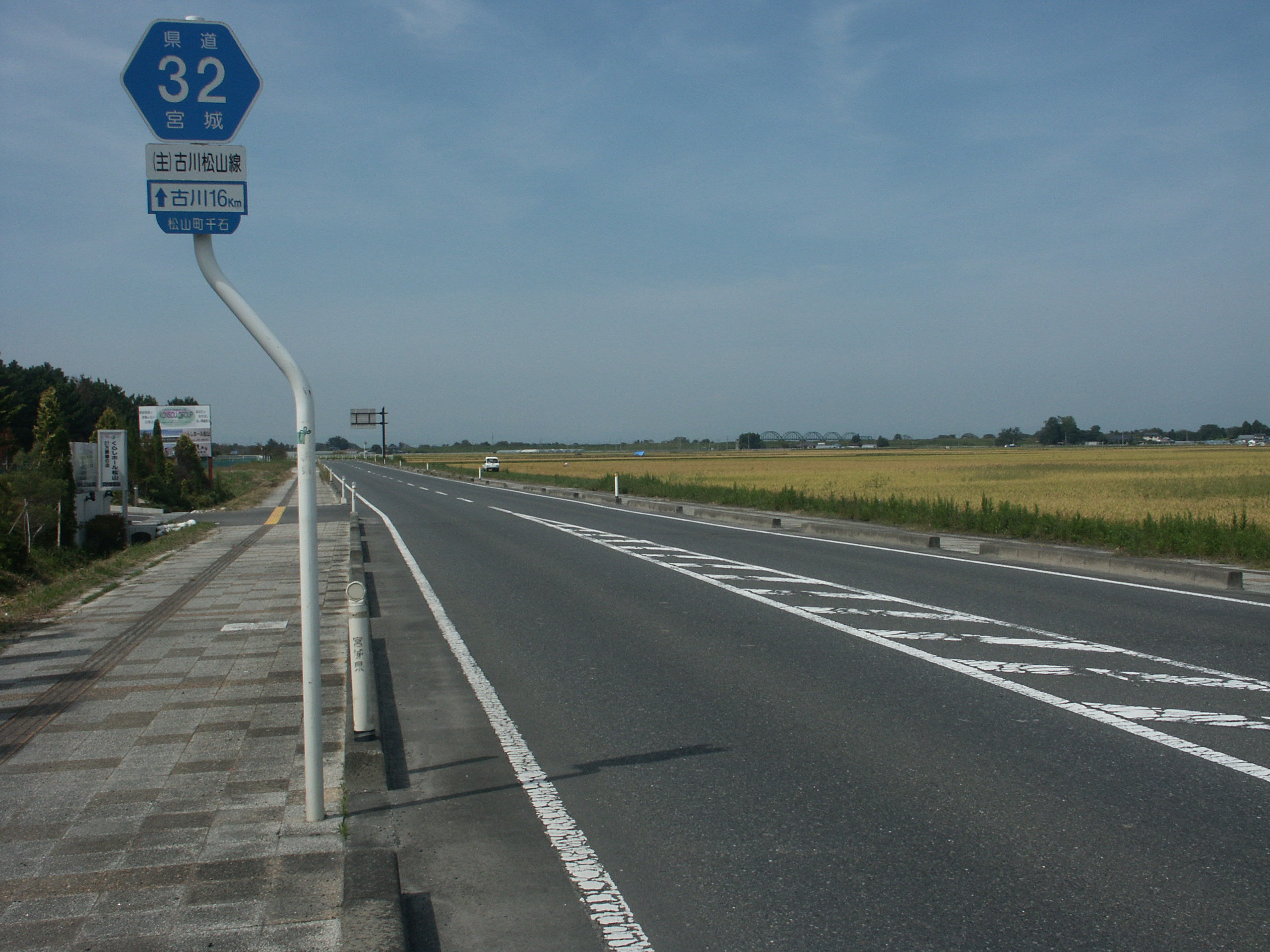 宮城県道32号線大崎市千石付近